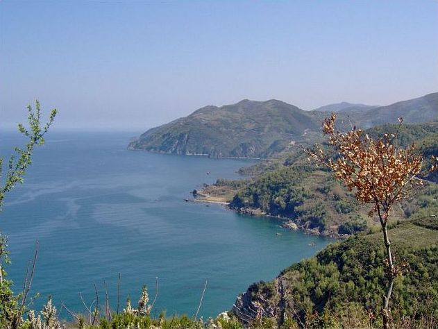 İnebolu, Kastamonu, Turkey.